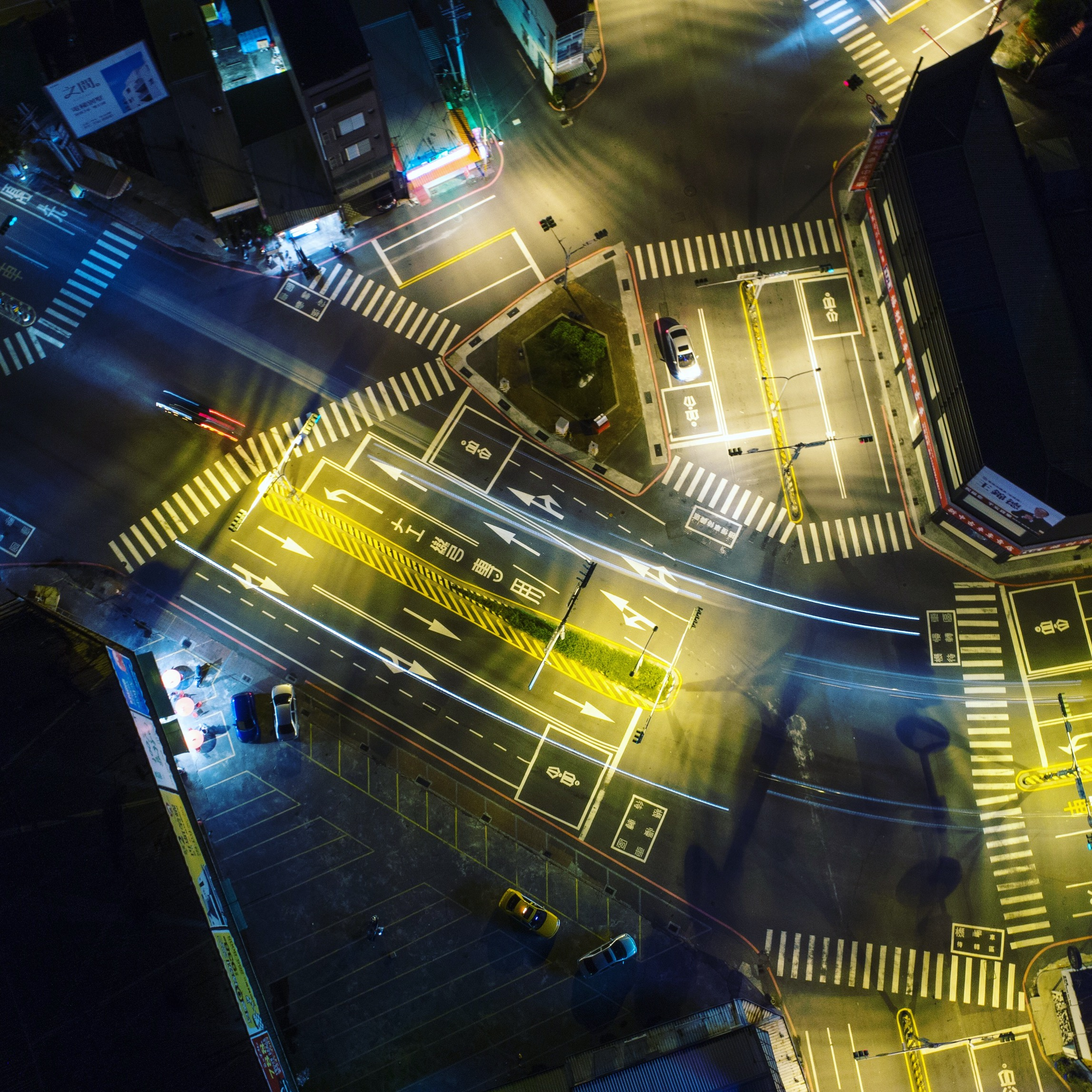 位於北安利多黃昏市場的北安路三段